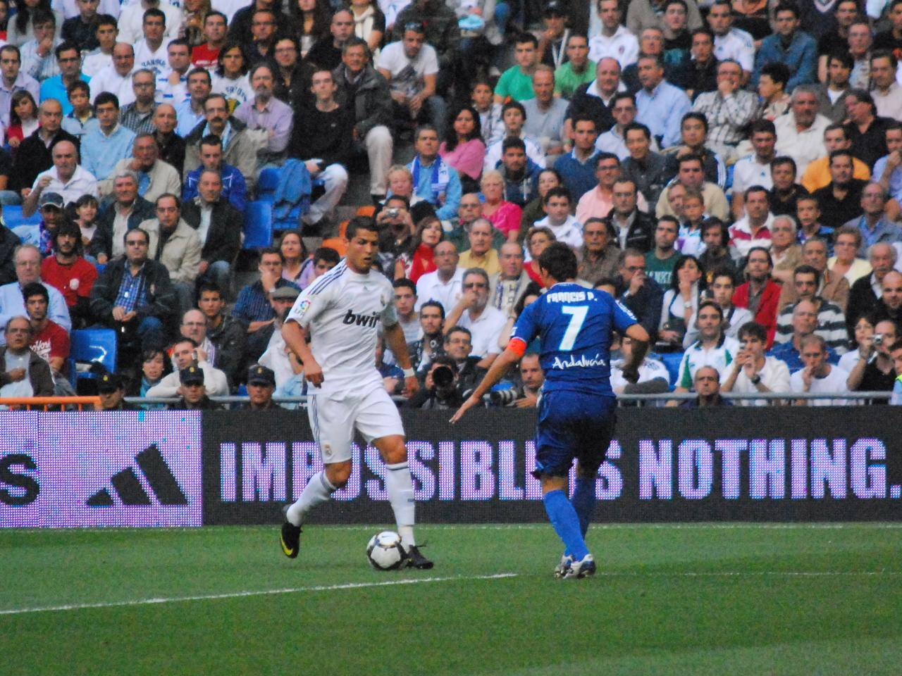 Real Madrid 5 - Xerez 0 20/9/09